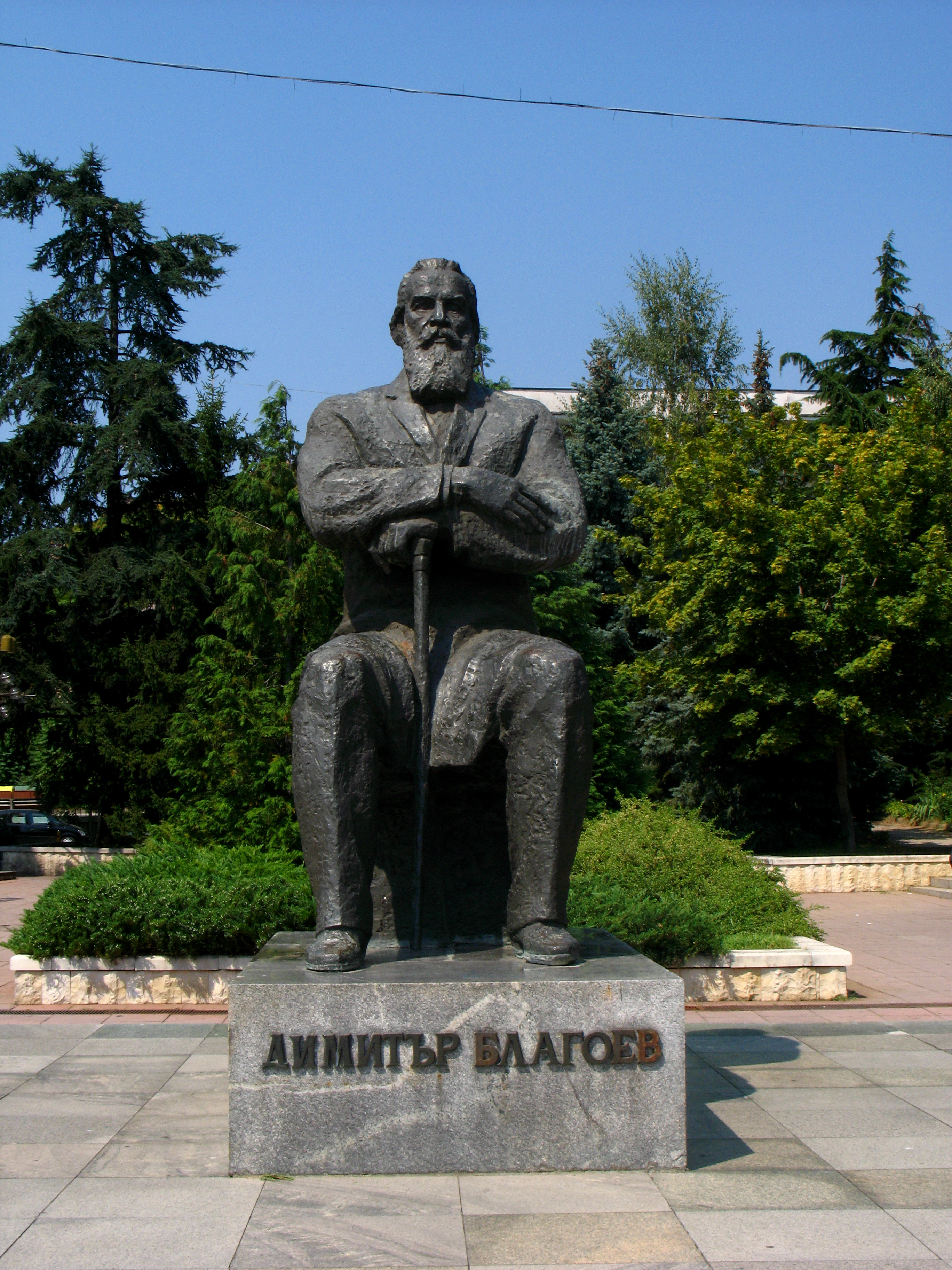 Скулптура на „Димитър Благоев“